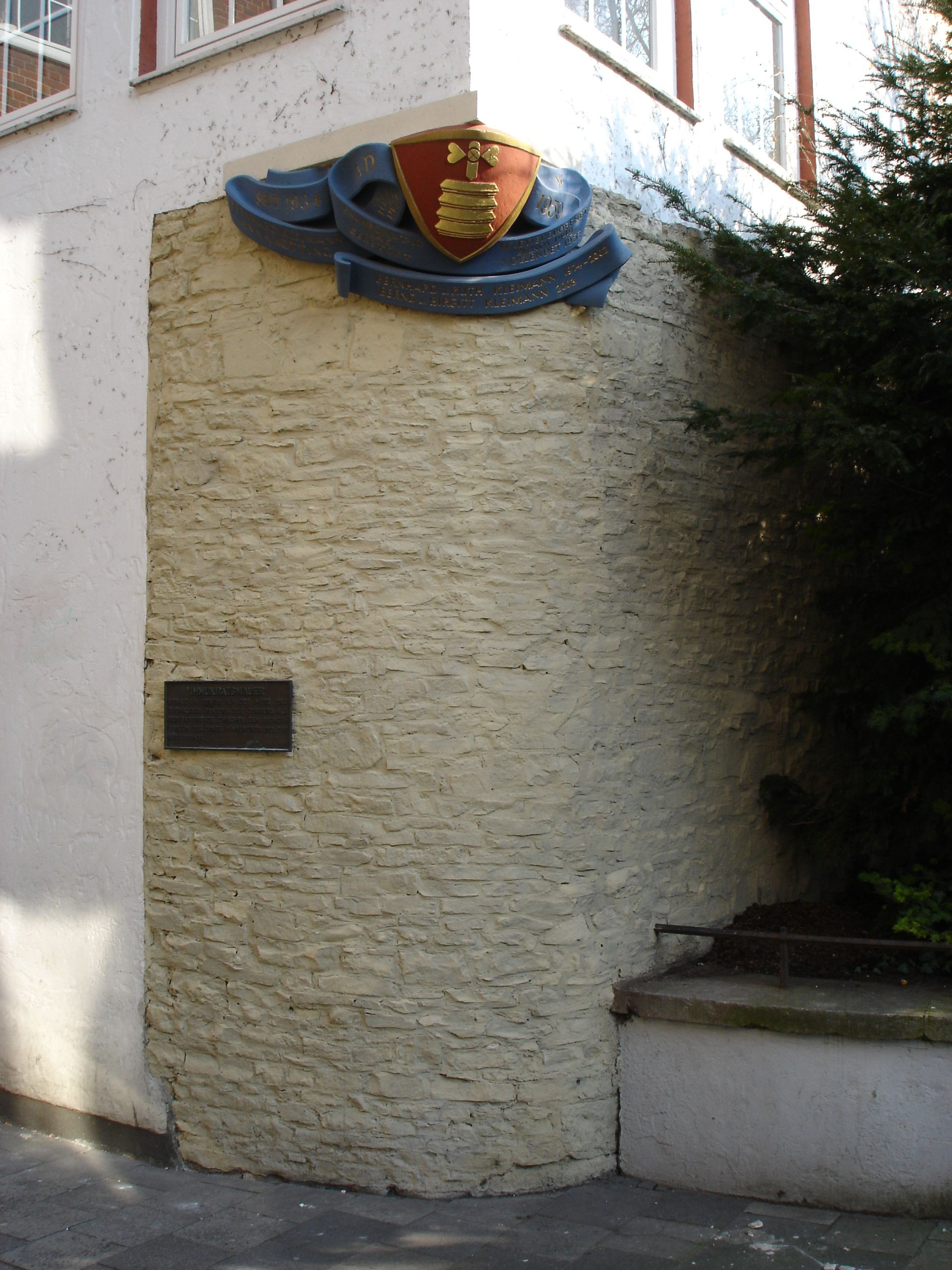 Letzter Rest der ehemaligen Immunitätsmauer zur Domburg in Münster